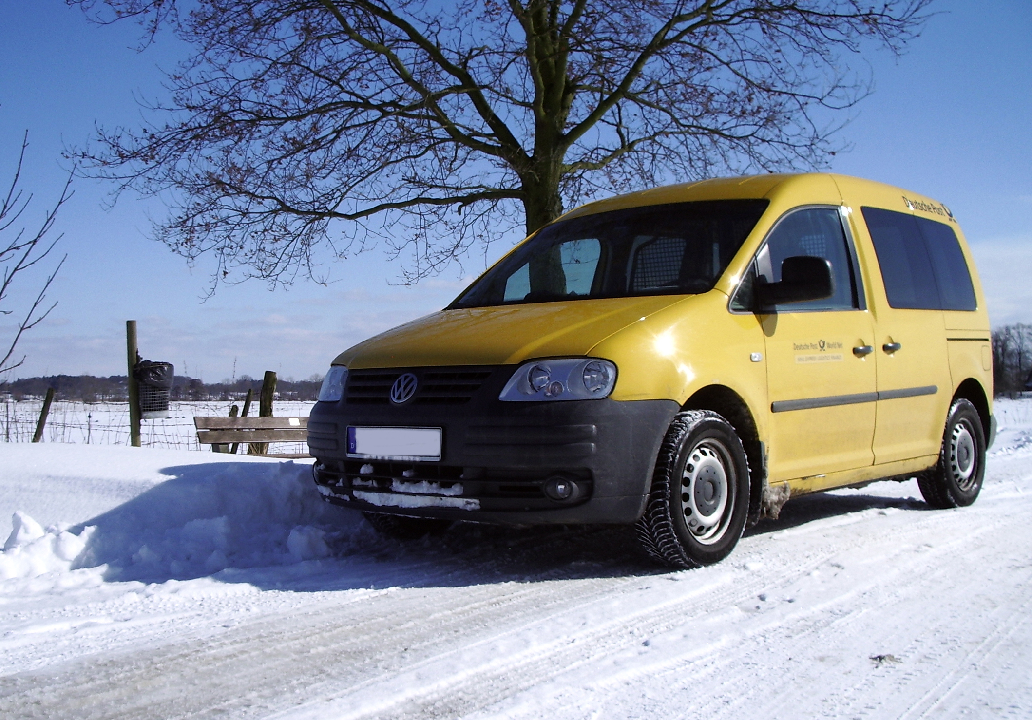 Volkswagen Caddy 2.0 SDI der Deutschen Post AG im Schnee